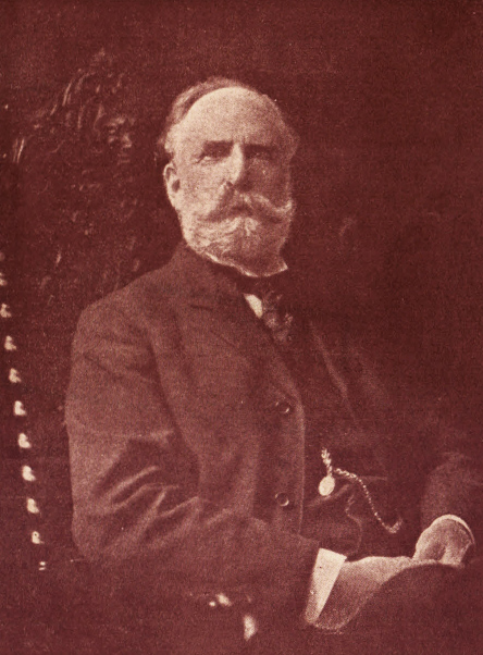 Edward Saxton Payson, usona esperantisto